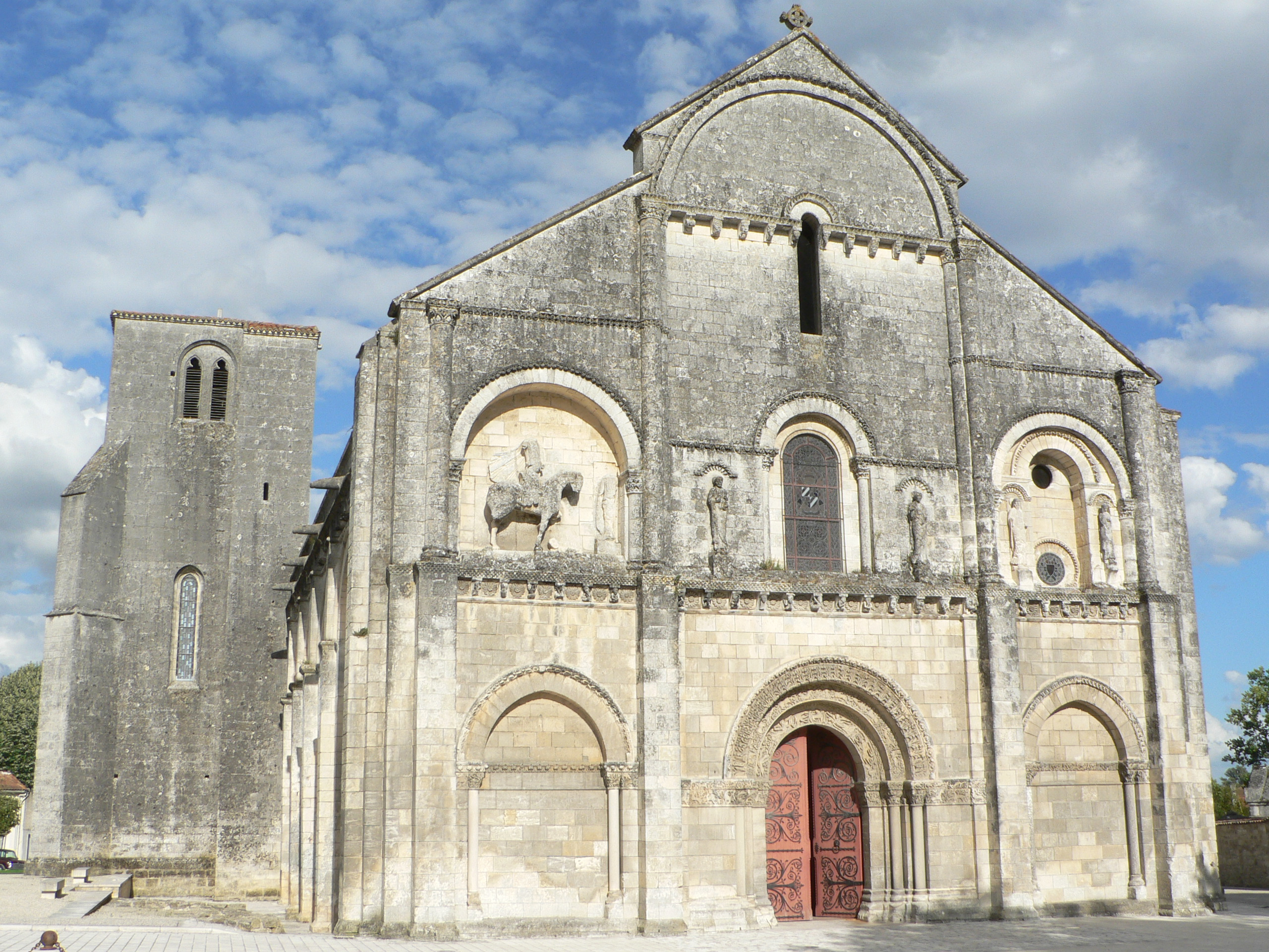 église et clocher (Châteauneuf-sur-Charente)